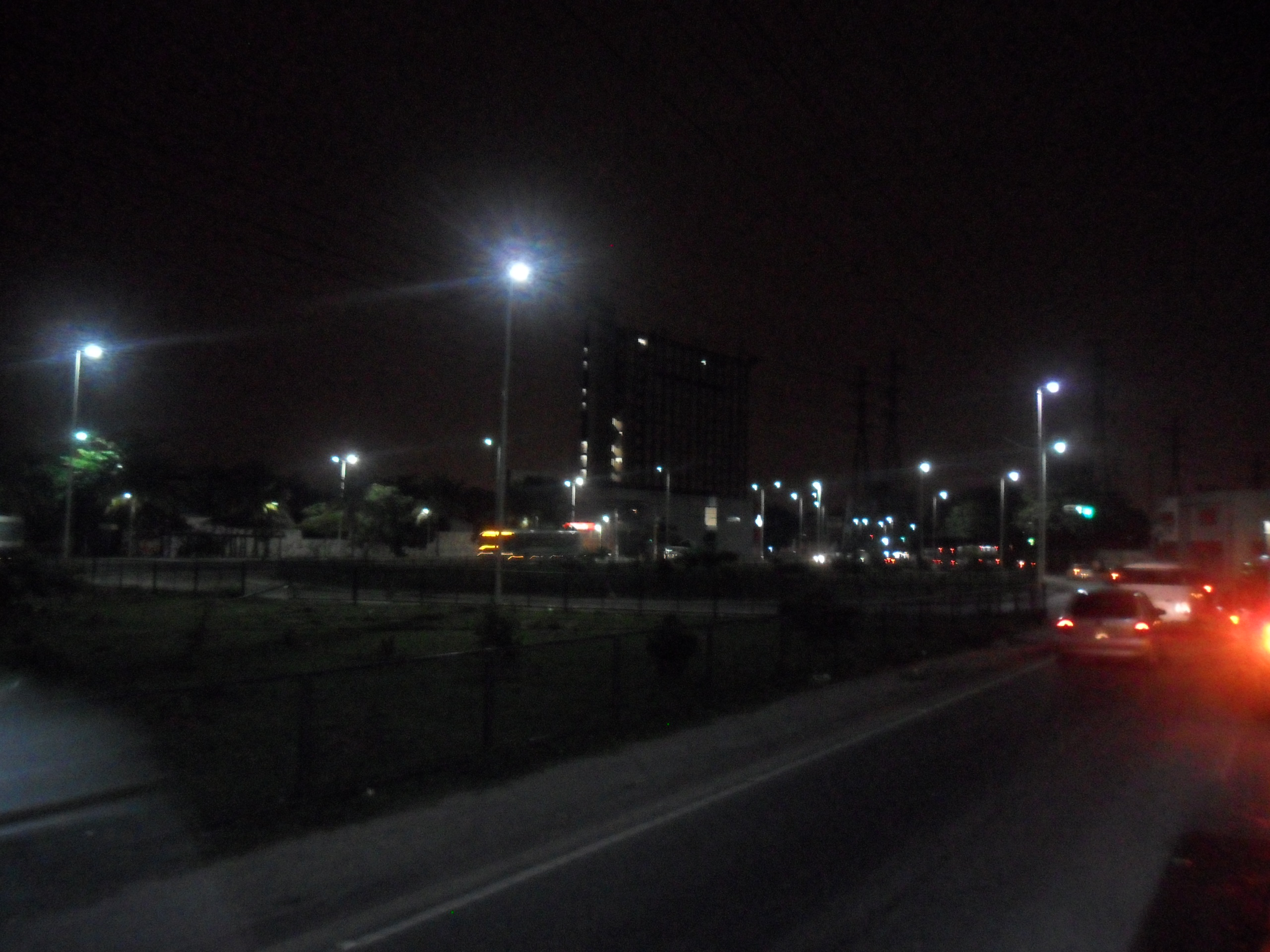 Via Light à noite.